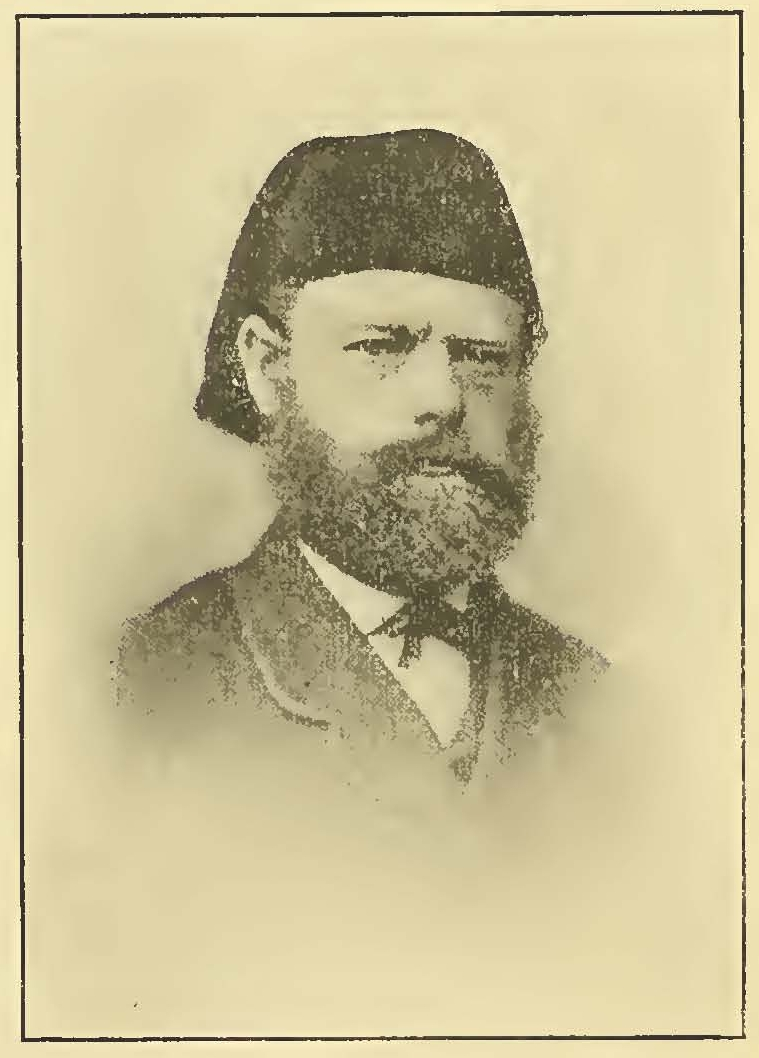 Carl Benjamin Klunzinger, vor 1914.